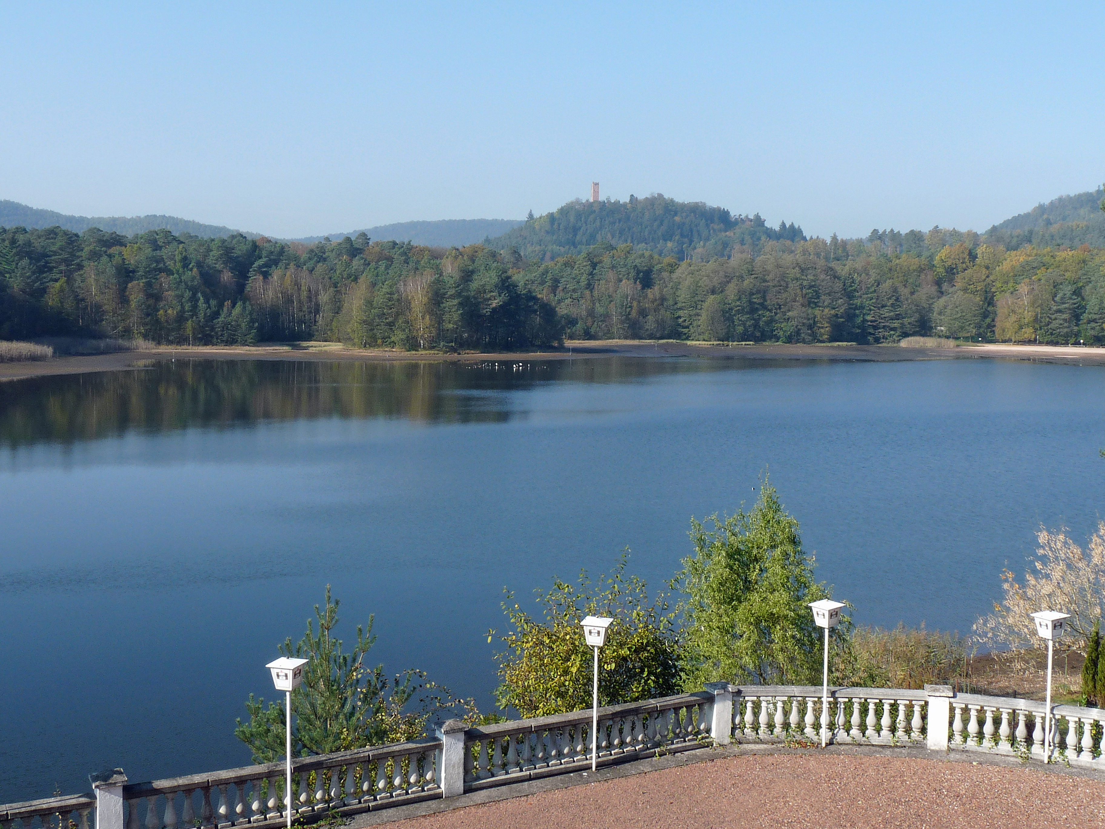 Etang de Hanau (Moselle)